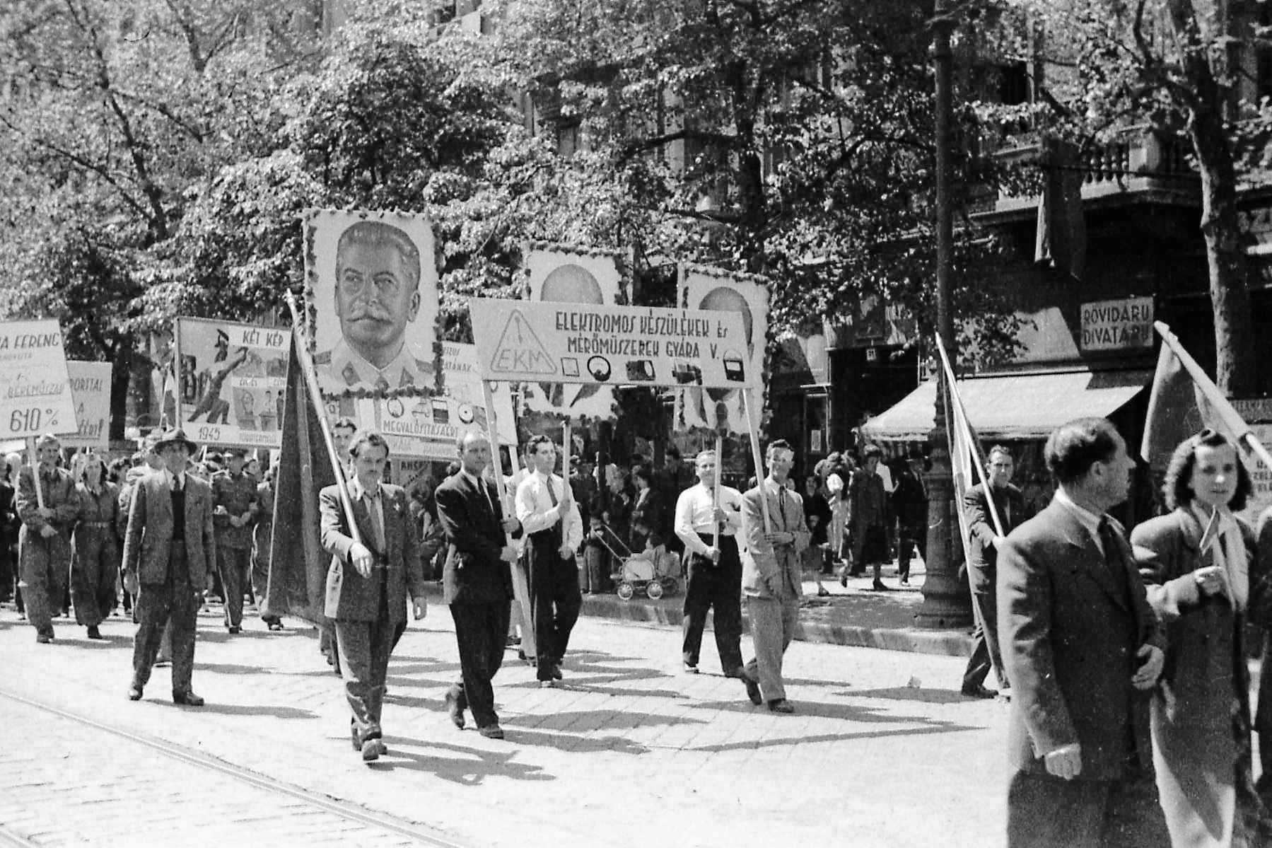 Május 1-i felvonulás kb. 1953